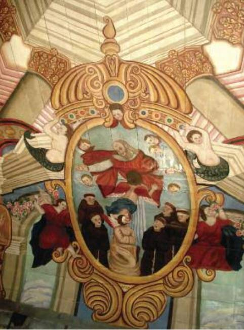 Detalhe de pintura no Convento de Santo Antônio de Cairu